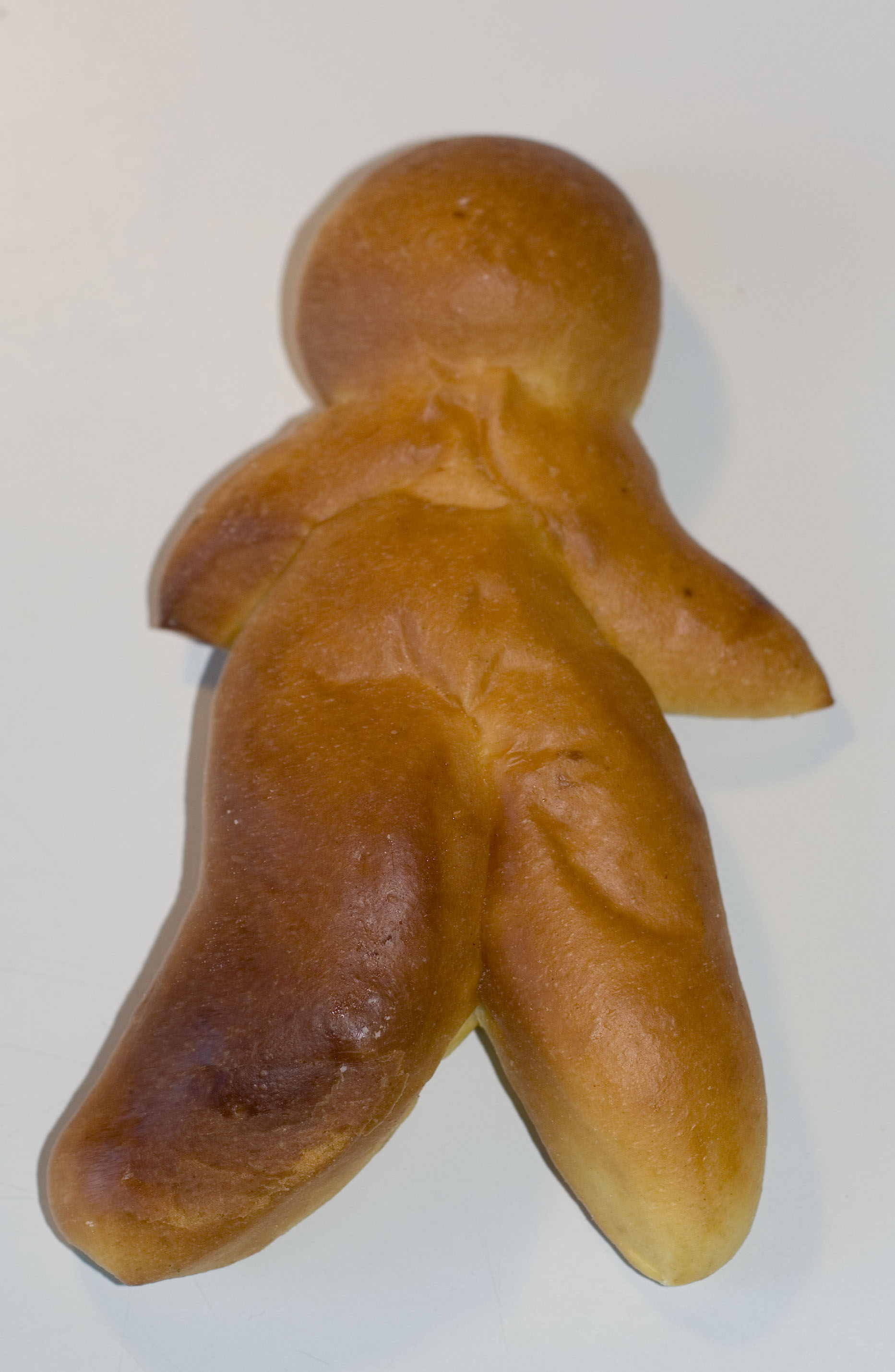 Mannele (pain au lait)